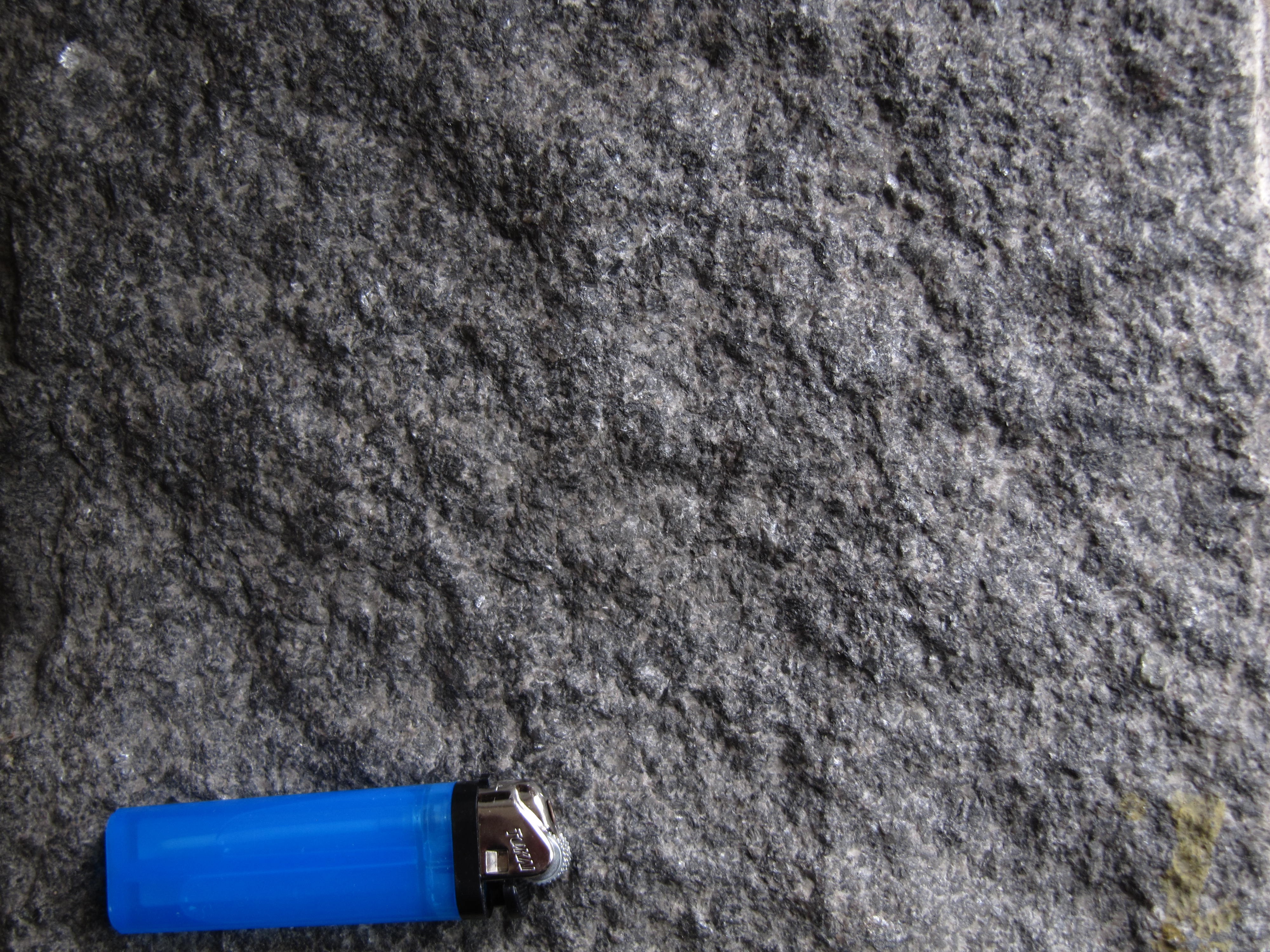 Hugget flade i Rønne granit; lighter er 8 cm